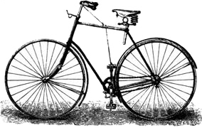 Früher Diamantrahmen - noch ohne Verbindung zwischen Sattel und Tretlager Aus: Wilhelm Wolf, Fahrrad und Radfahrer, Leipzig, 1890, Abb. 227 (S. 110), Public Domain Rainer Zenz 20:26, 13. Feb 2004 (CET)